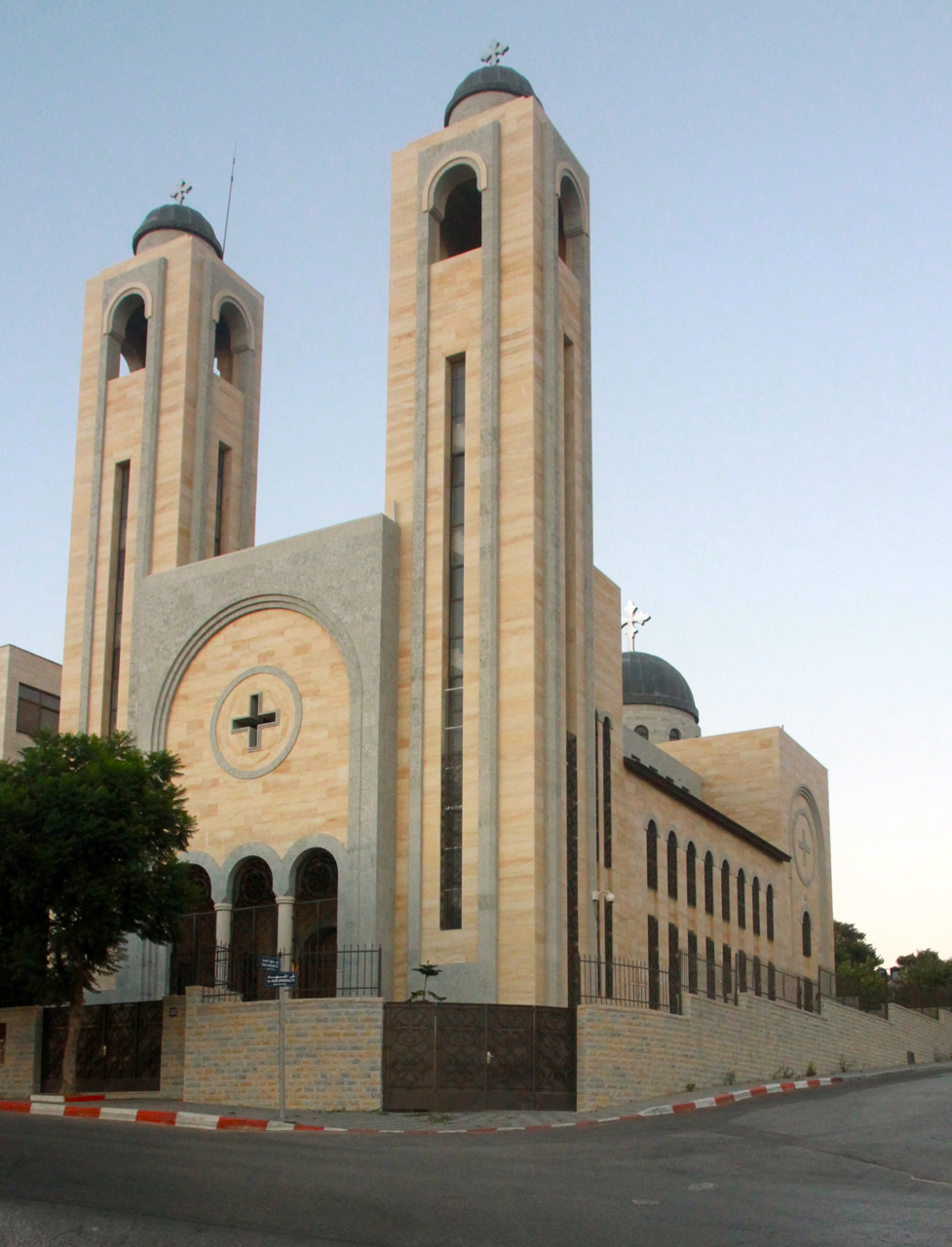 Ramallah, Palästina.